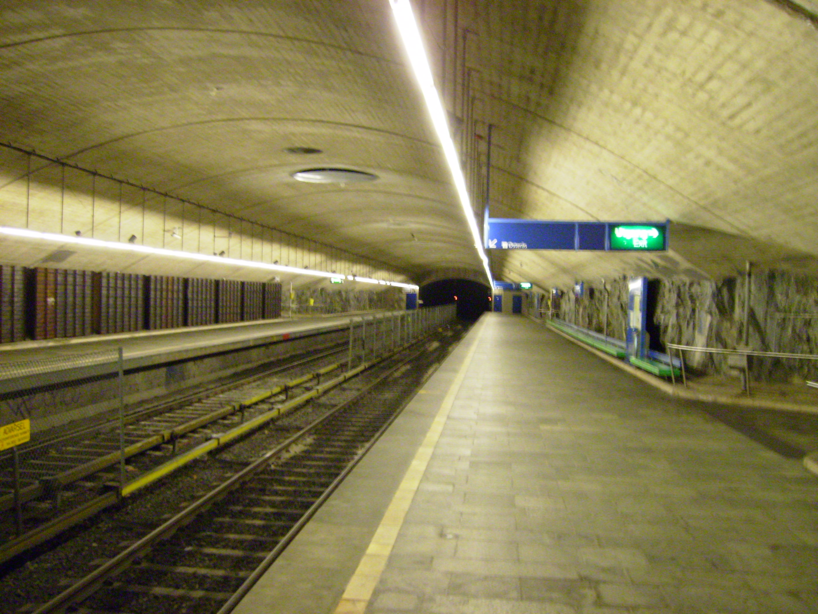 Metro station Ellingsrudåsen in Oslo. View towards next station Furuset - T-banestasjonen Ellingsrudåsen i Oslo. Retning mot neste stasjon Furuset.